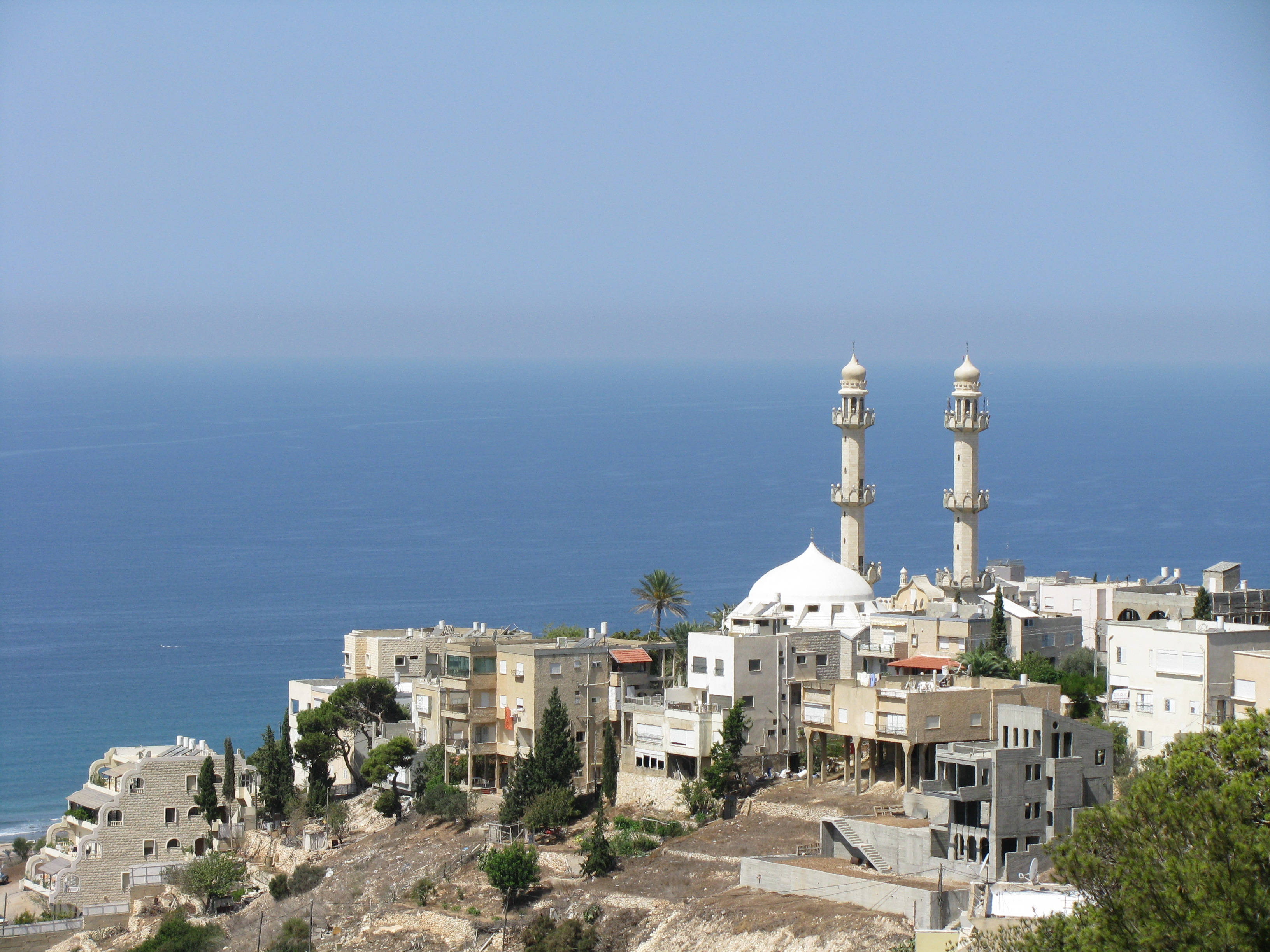 מסגד סיידנא מחמוד בשכונת כבביר בחיפה